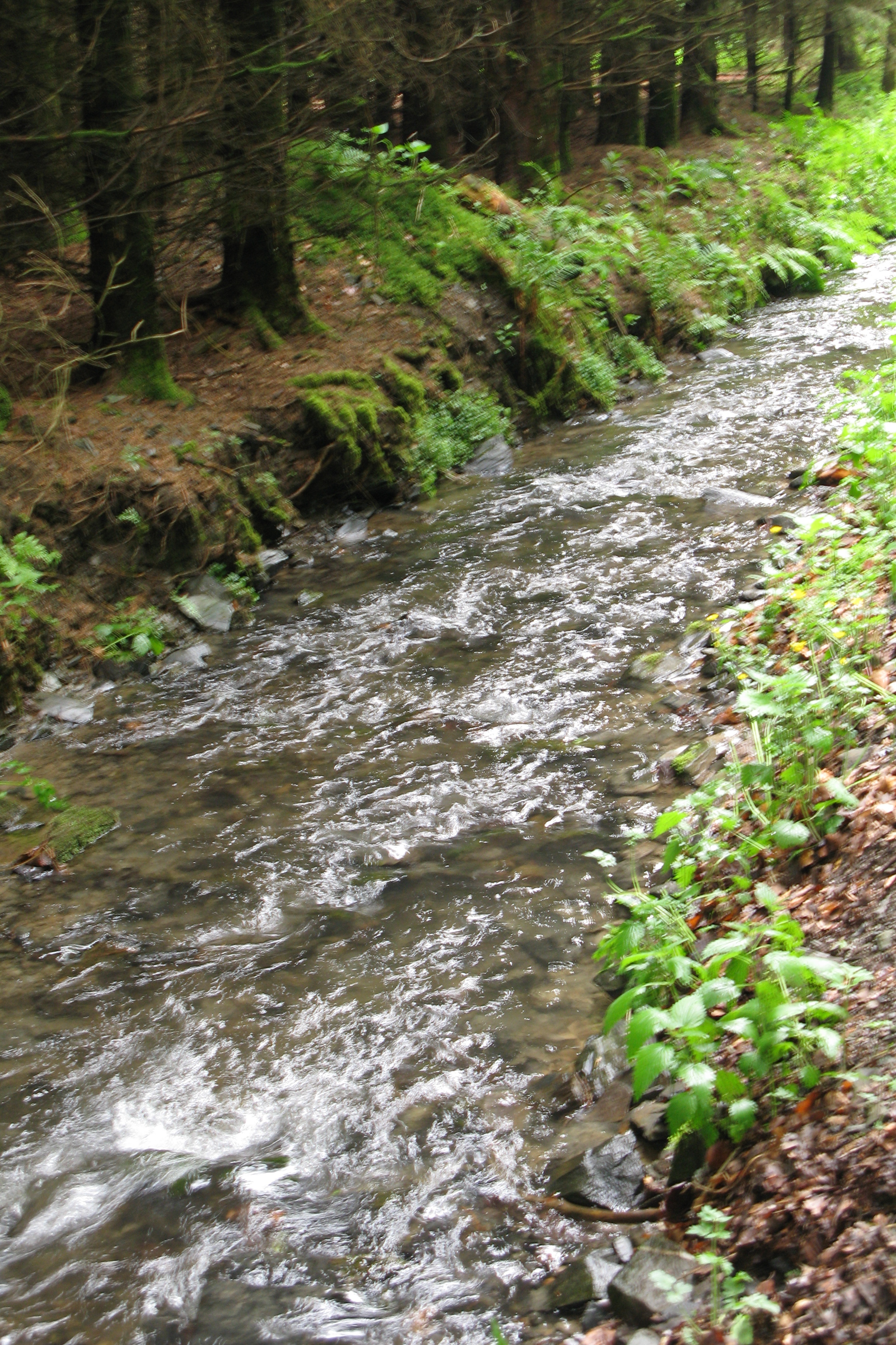 D'Rimmelbaach Laanscht de Wee vun der Kléimillen op Hëpperdang am Mee 2008. Kategorie:Baachen zu Lëtzebuerg